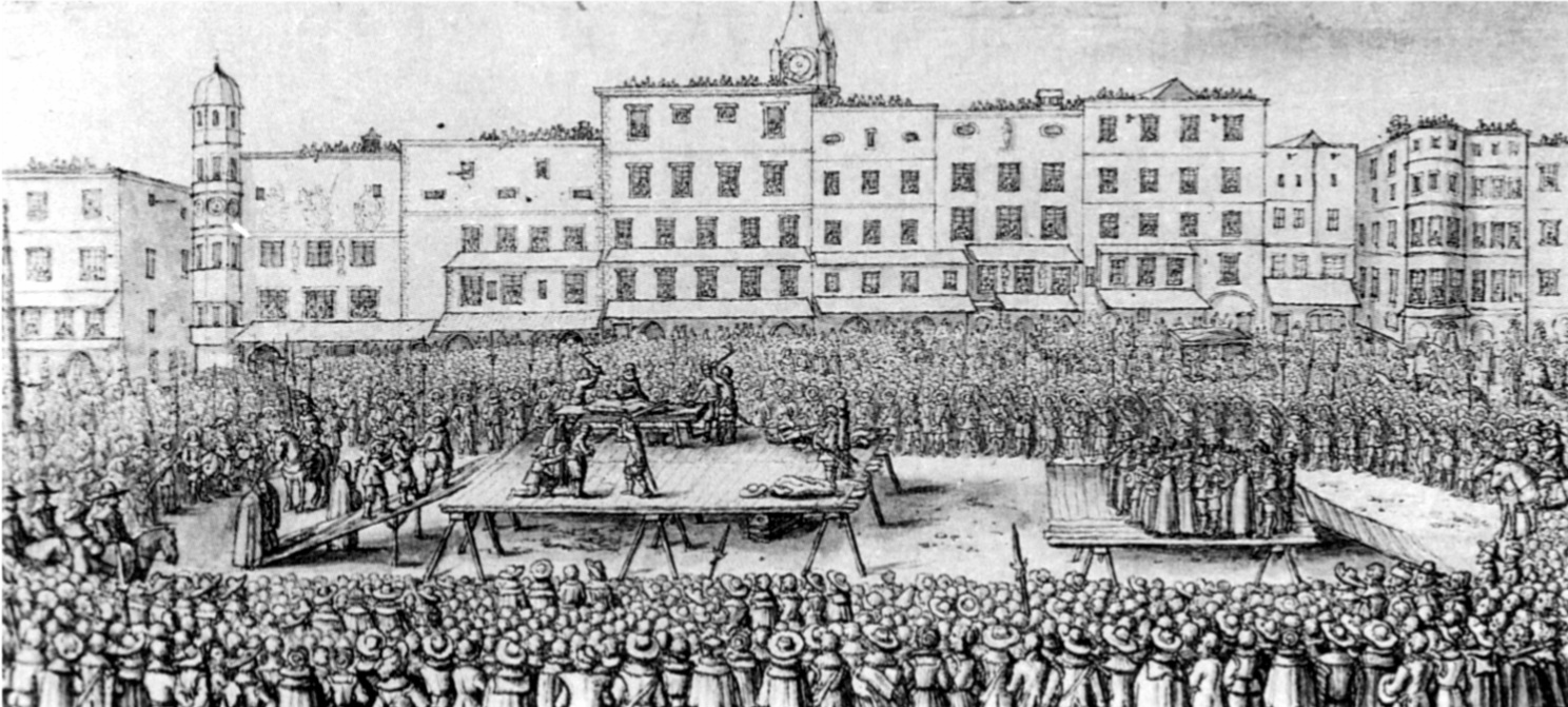 Die Hinrichtung Martin Aichingers (genannt Laimbauer) und weiterer sechs Anführer eines Bauernaufstandes am Linzer Hauptplatz am 20. Juni 1636. Zeichnung aus der Sammlung des Herzogs von Devonshire